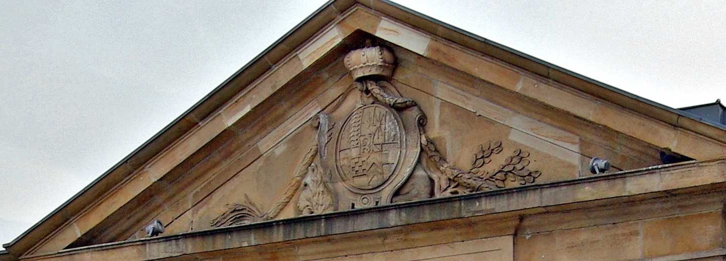 Frankenthal Wormser Tor Giebelfeld, ehem. Feldseite